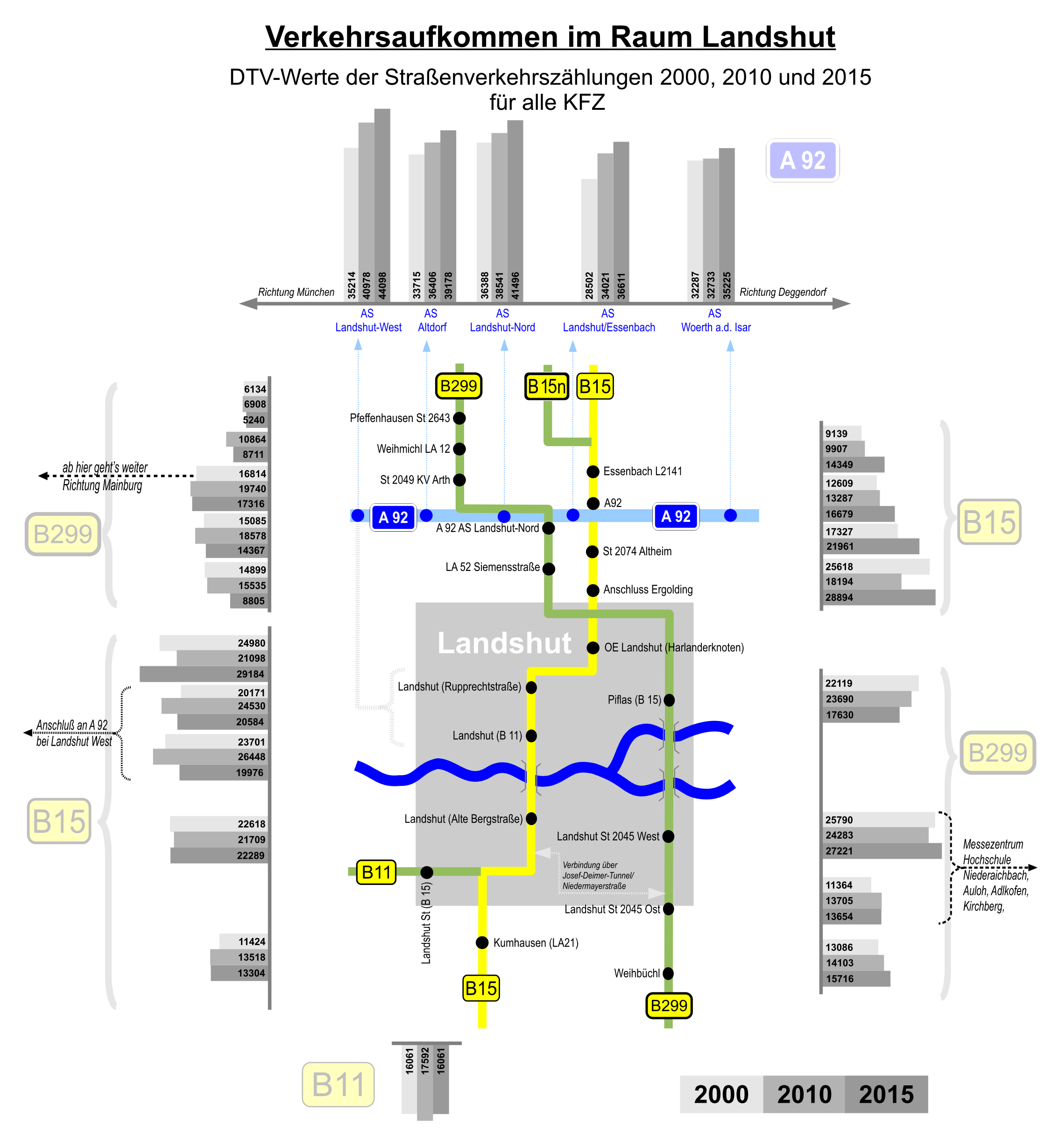 Darstellung der Verkehrsströme für alle KFZ im Bereich Landshut anhand der DTV-Werte aus den Verkehrszählungen 2000 und 2010